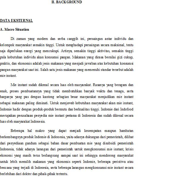 Contoh teks latar belakang.